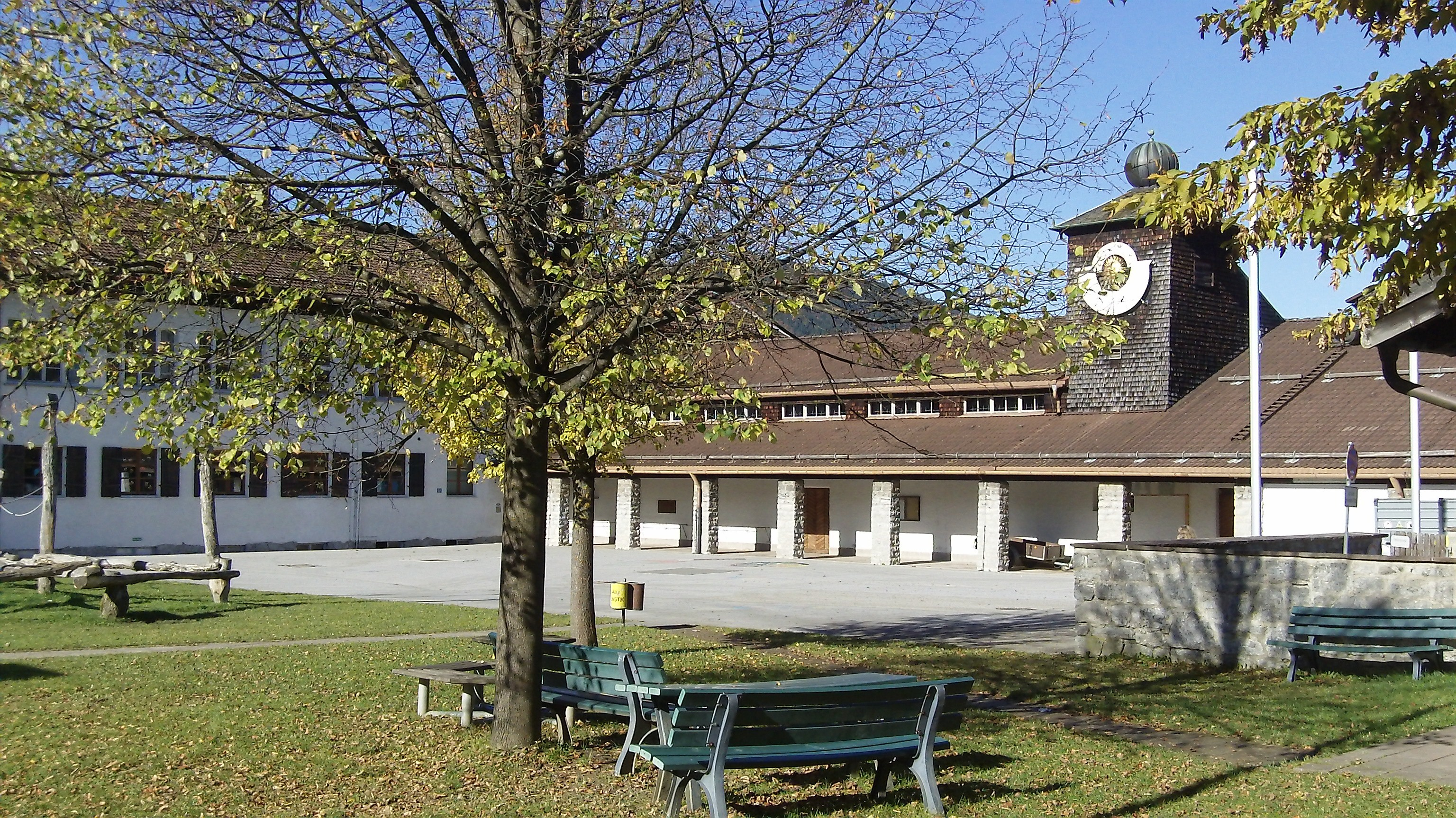 Schule mit Feuerwehr, zweiflügelige rechtwinklige Anlage im alpenländischem Heimatstil, westlicher Trakt zweigeschossigen Flachsatteldachbau mit Putzdekor, nördlicher Trakt eingeschossiger Flachsatteldachbau mit vorgelagerter Pausenhalle und verschindeltem Zwiebelturm, bezeichnet mit dem Jahr 1935This is a photograph of an architectural monument.